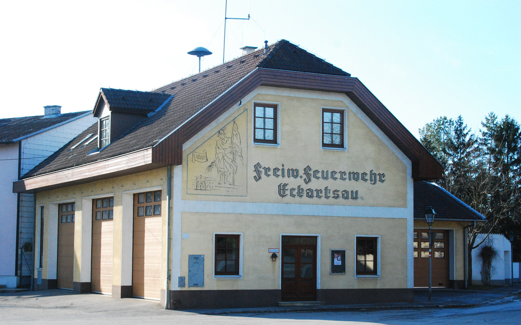 Gerätehaus der Freiwiligen Feuerwehr Eckartsau in Eckartsau